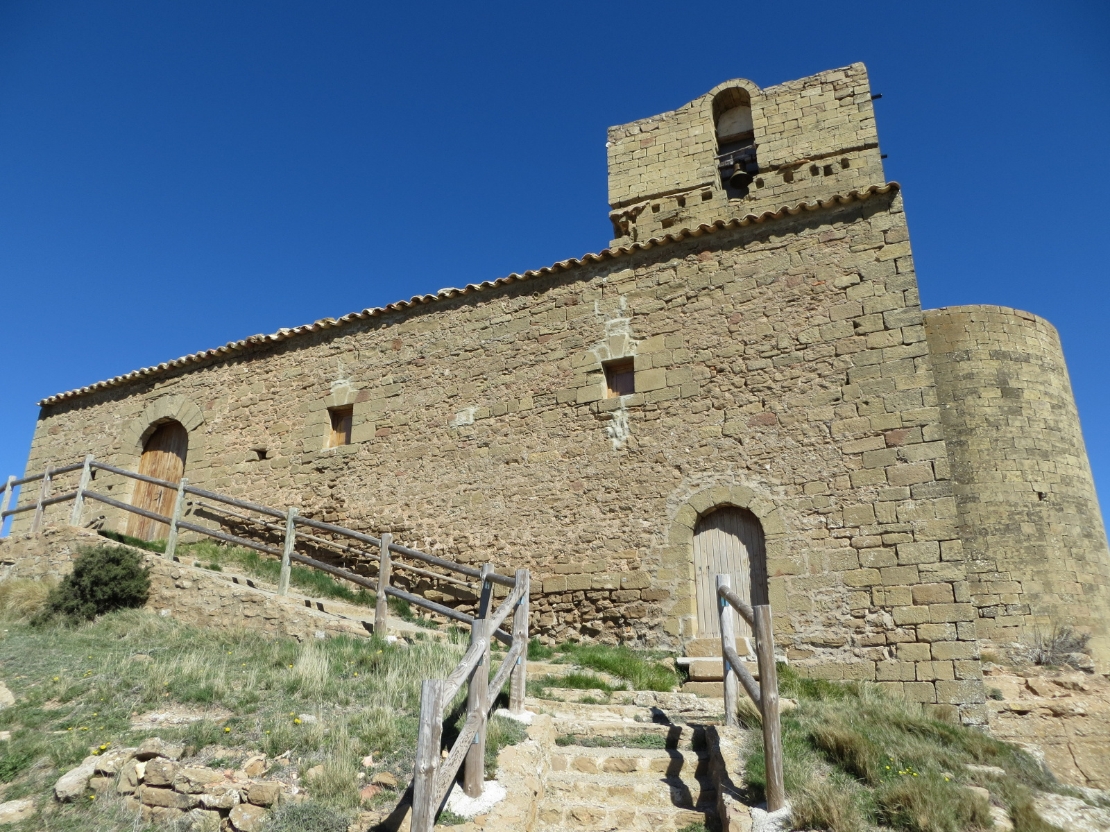 Ermita de Nra. Sra. de Marcuello en Sarsamarcuello (Huesca)